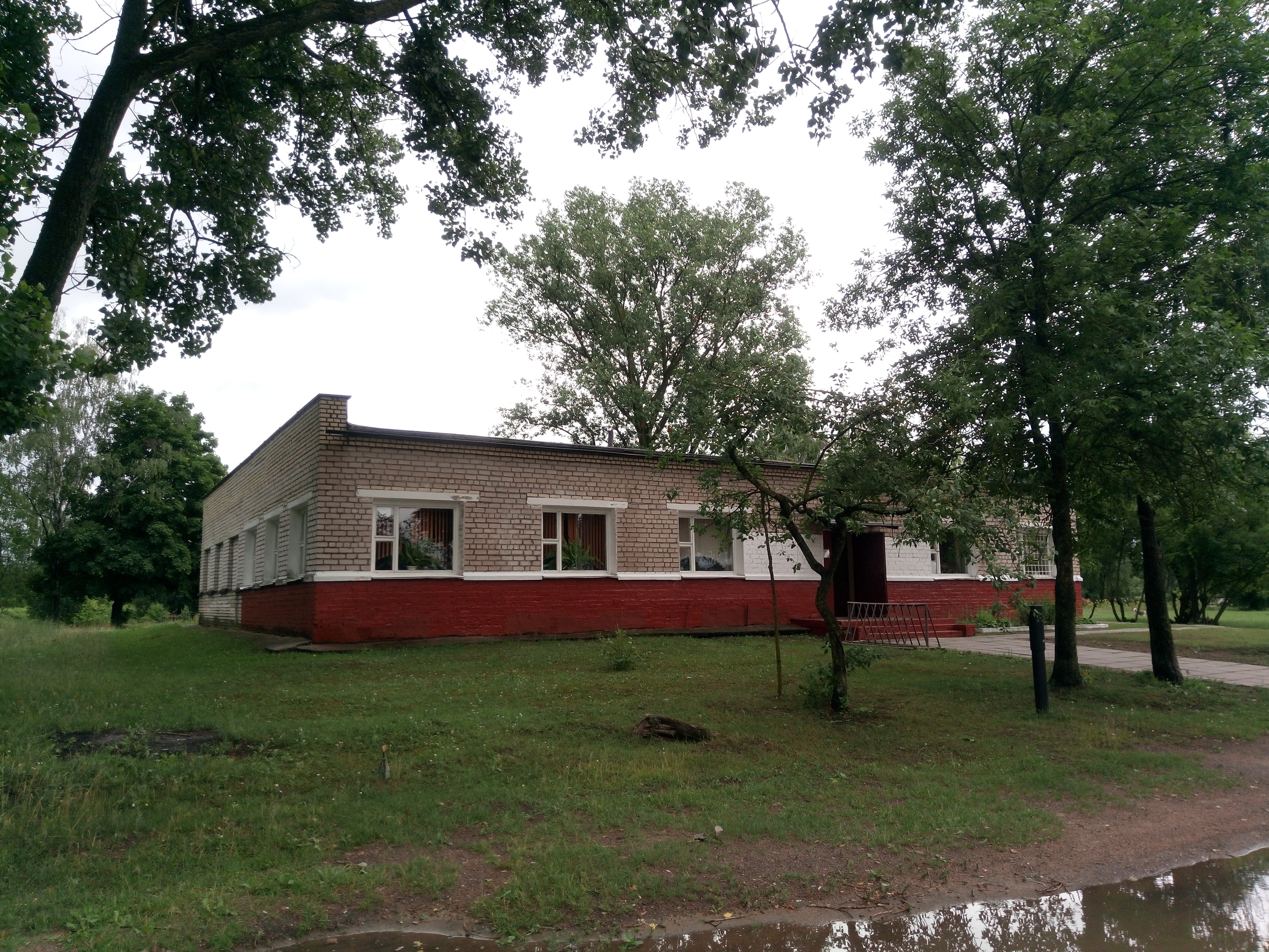 Дом культуры, бібліятэка.